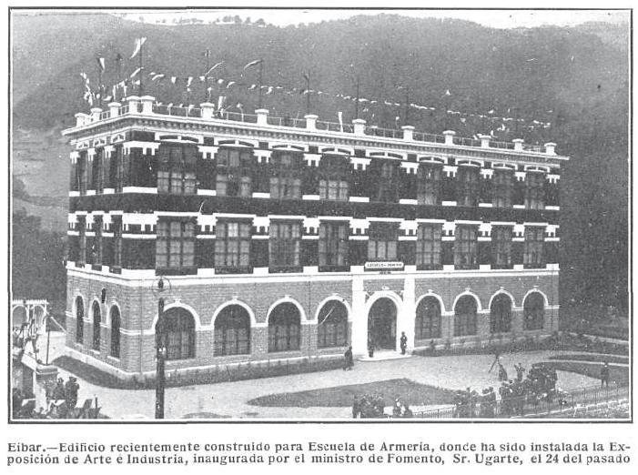 Imagen de la Escuela de Armería de Éibar tomada con cámara de la revista Mundo Gráfico